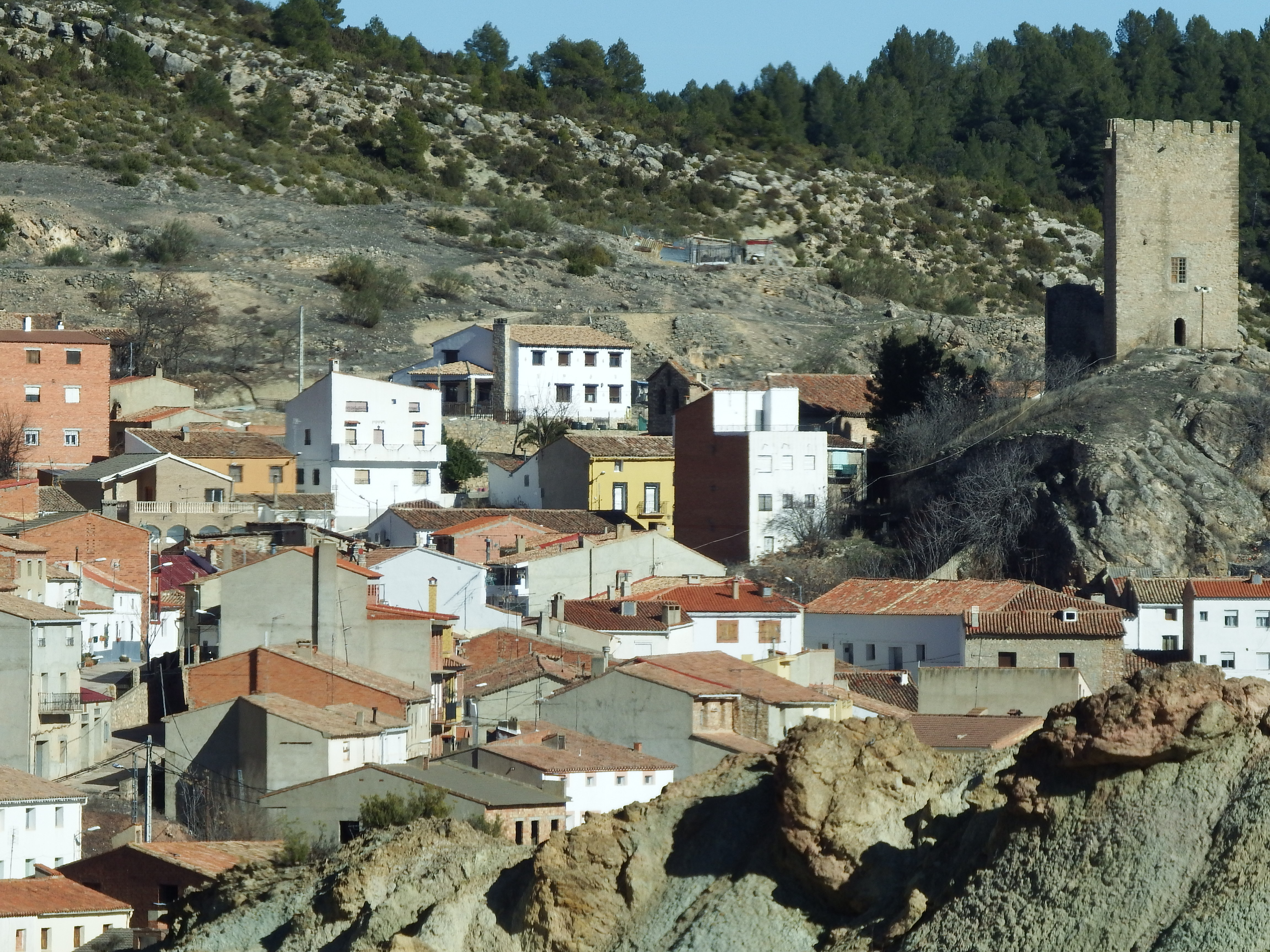 Vista general de Víllora